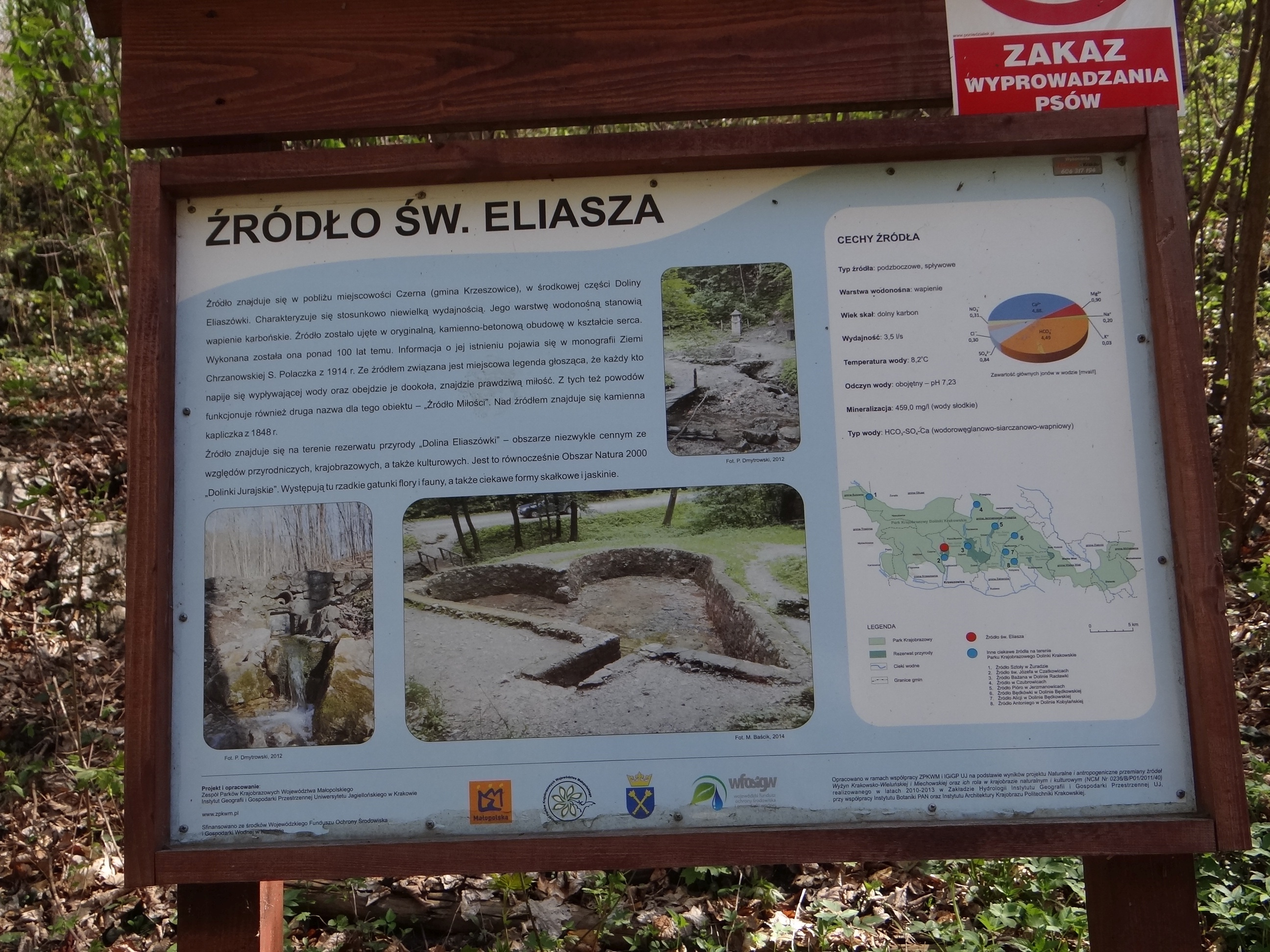 Źródło proroka Eliasza